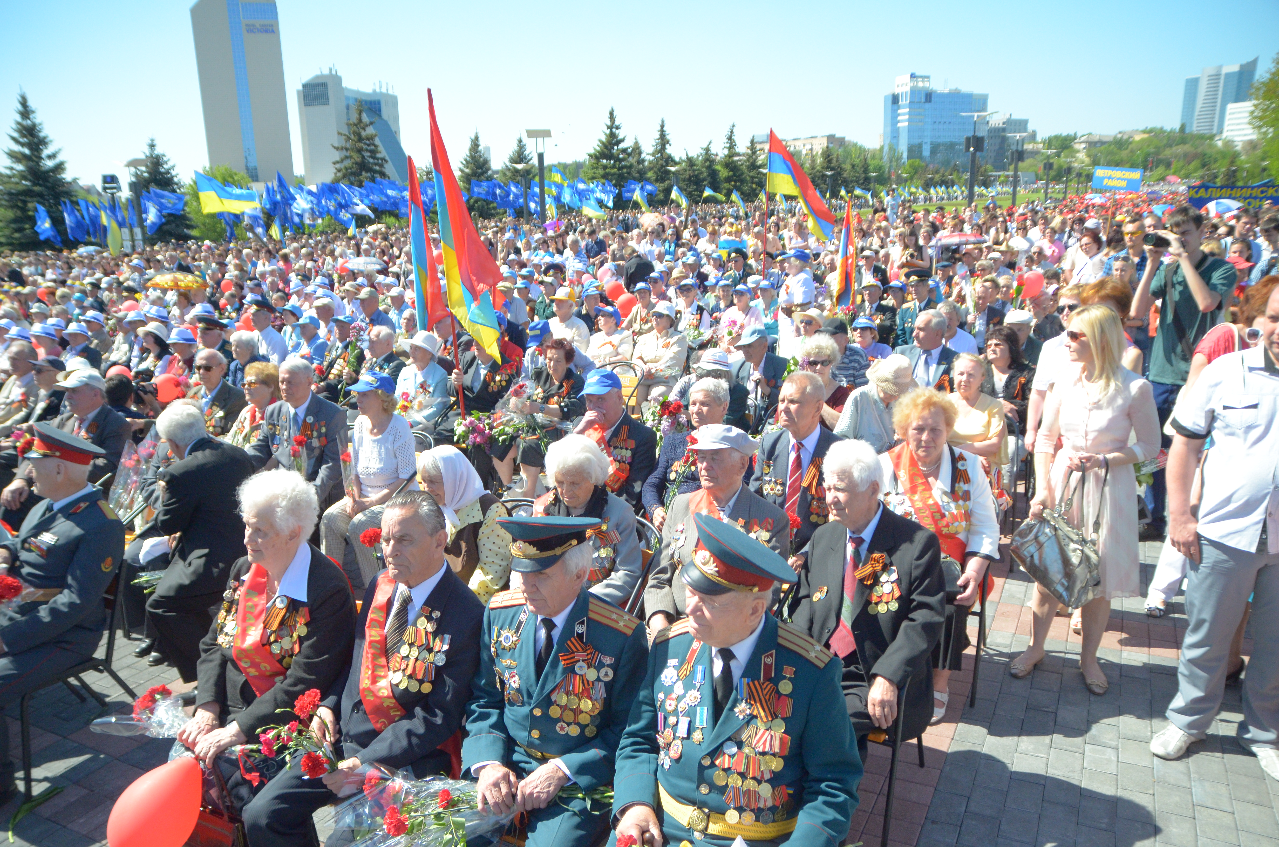 День Победы в Донецке